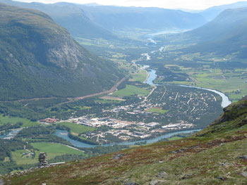 Skjåk, Norway